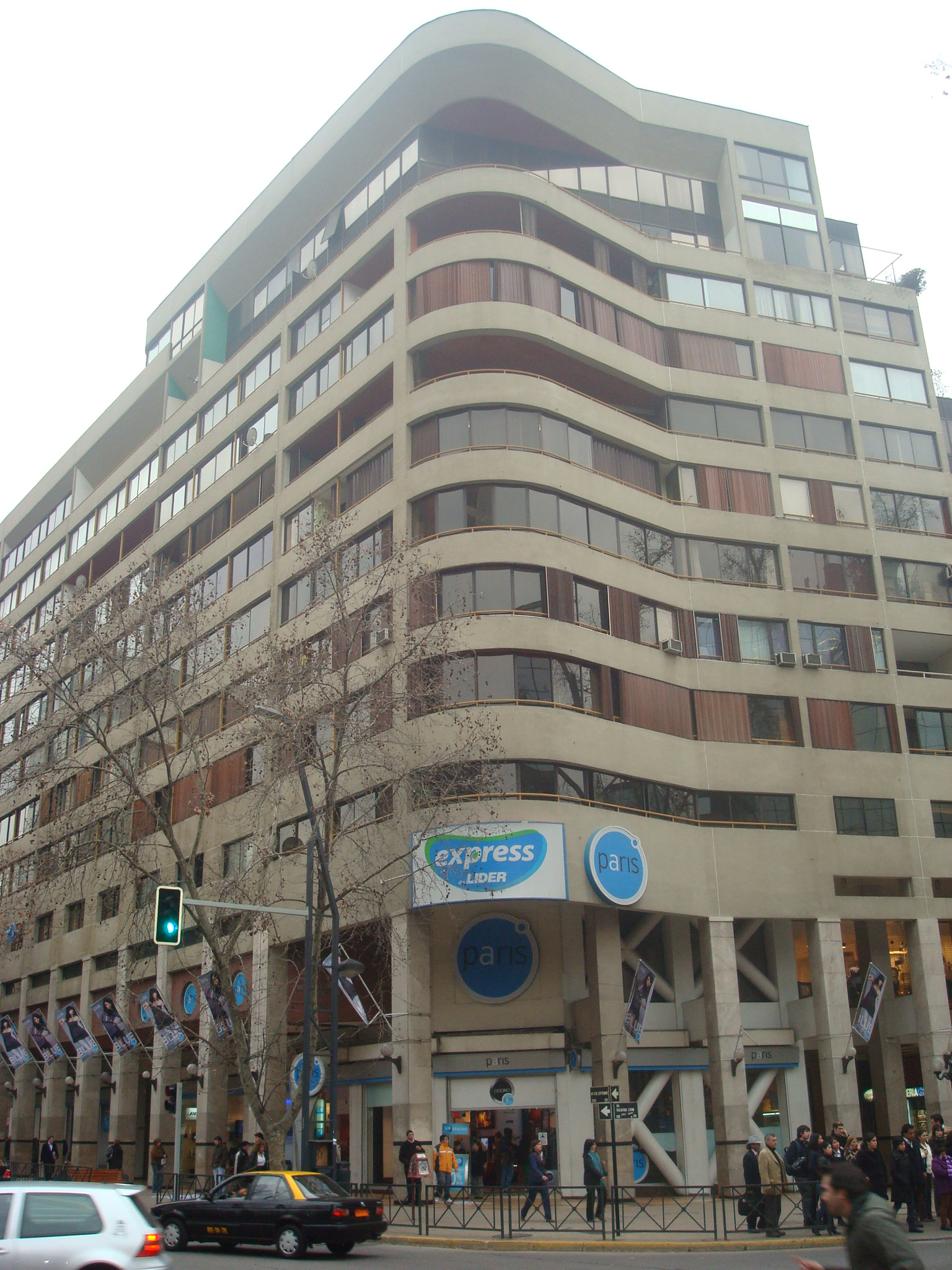 París Plaza Lyon, Providencia, Santiago de Chile